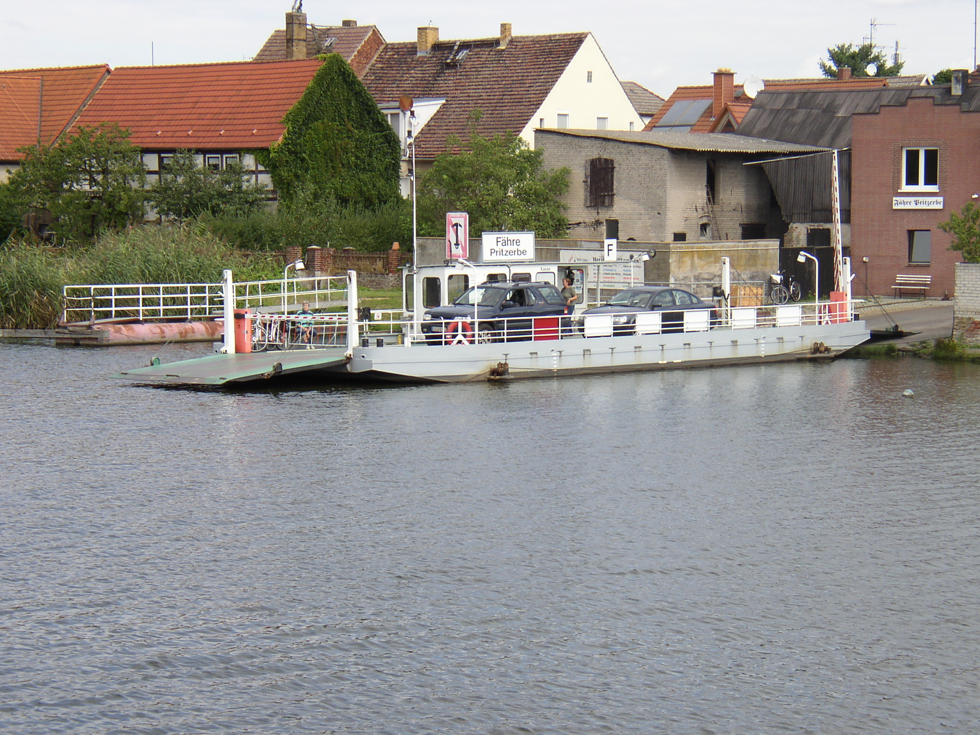 Seilfähre Pritzerbe (Stadt Havelsee)